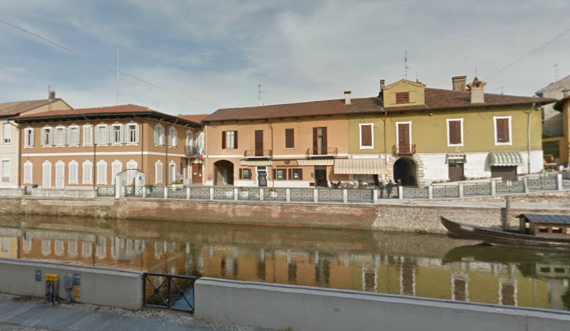 Veduta dei magazzini della grangia certosina e del palazzo comunale di Boffalora sopra Ticino (MI) - Italy